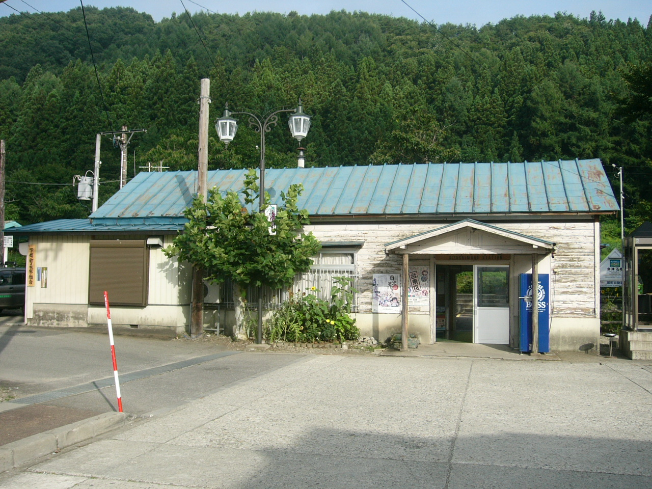 Aizushimogo Station